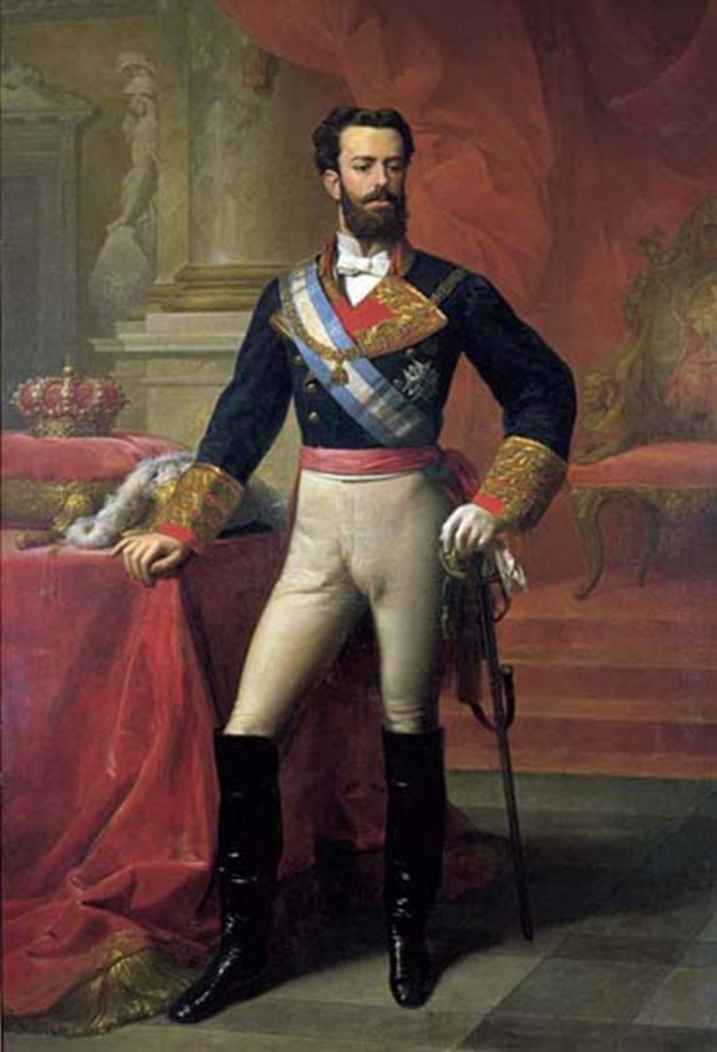 Retrato del rey Amadeo I de España (1845-1890), vestido con uniforme de capitán general y portando el collar de la Orden del Toisón de Oro.